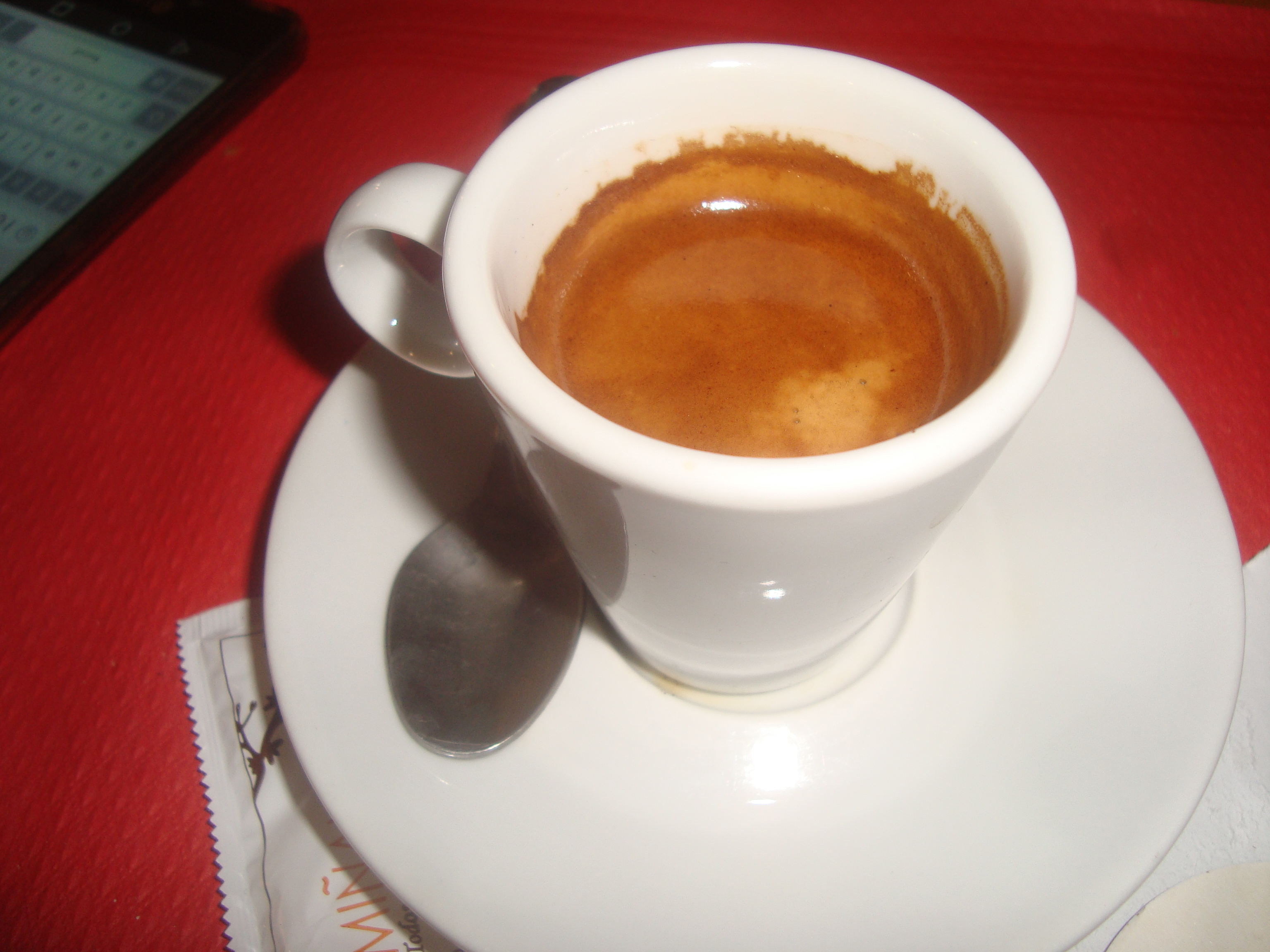 Café expreso corto.